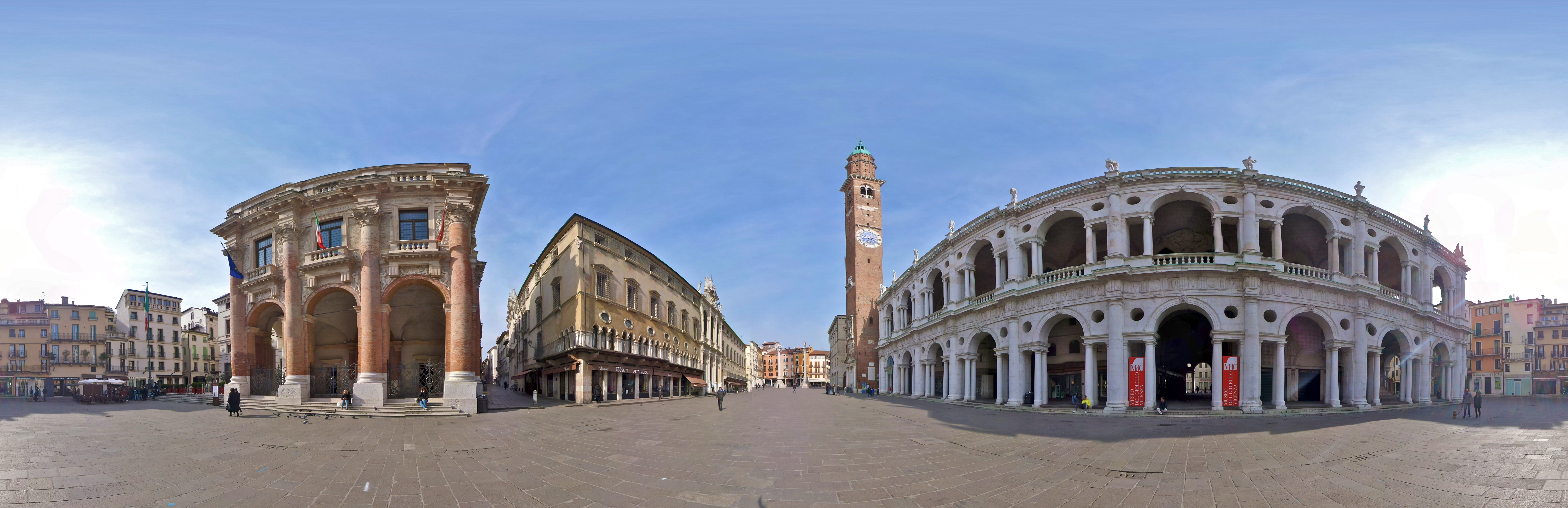 Vista panoramica a 360° su Piazza dei Signori, Vicenza